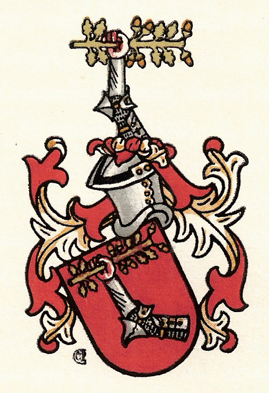 Wappen der Familie Kommerell in der ab Ende des 17. Jahrhunderts üblichen Form: geharnischter Arm mit Prügel mit Eichenblättern, sowie einem Helm, Ästen und einem Schild, das ebenfalls einen geharnischter Arm mit Prügel darstellt